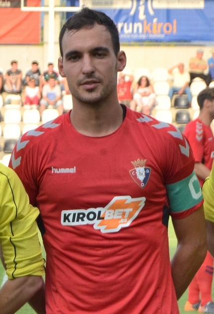 CSC_0153